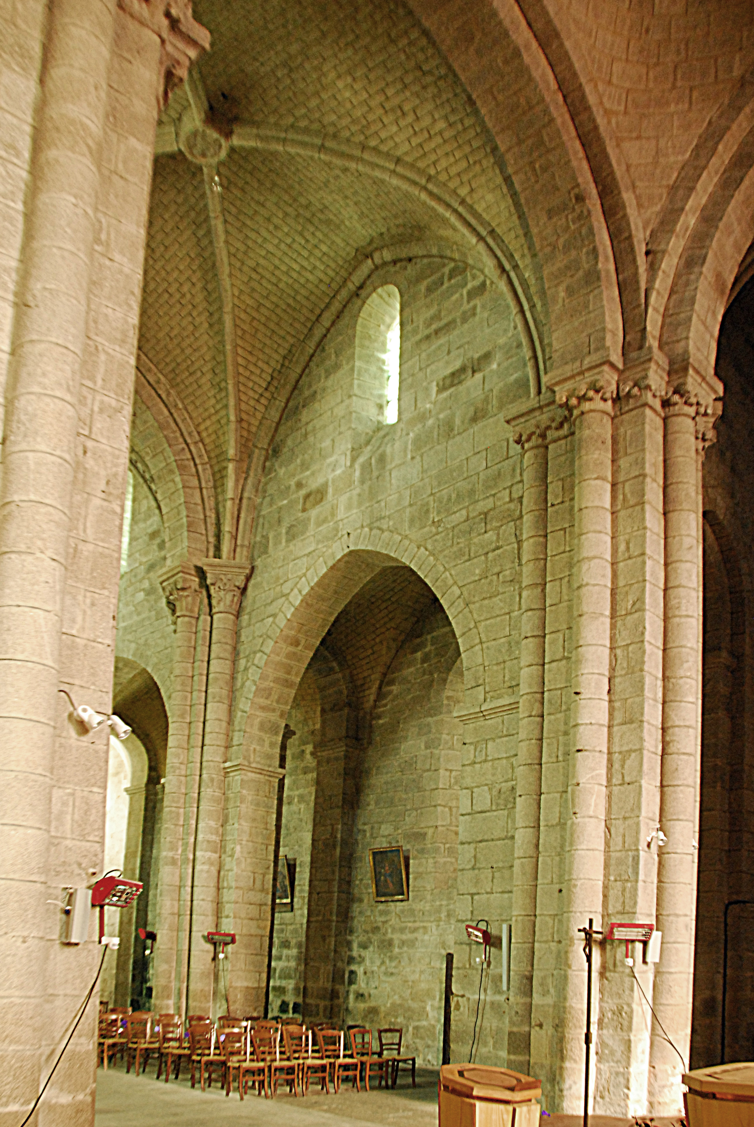 N.-D. de La Souterraine, Joch 5 aus Vierung